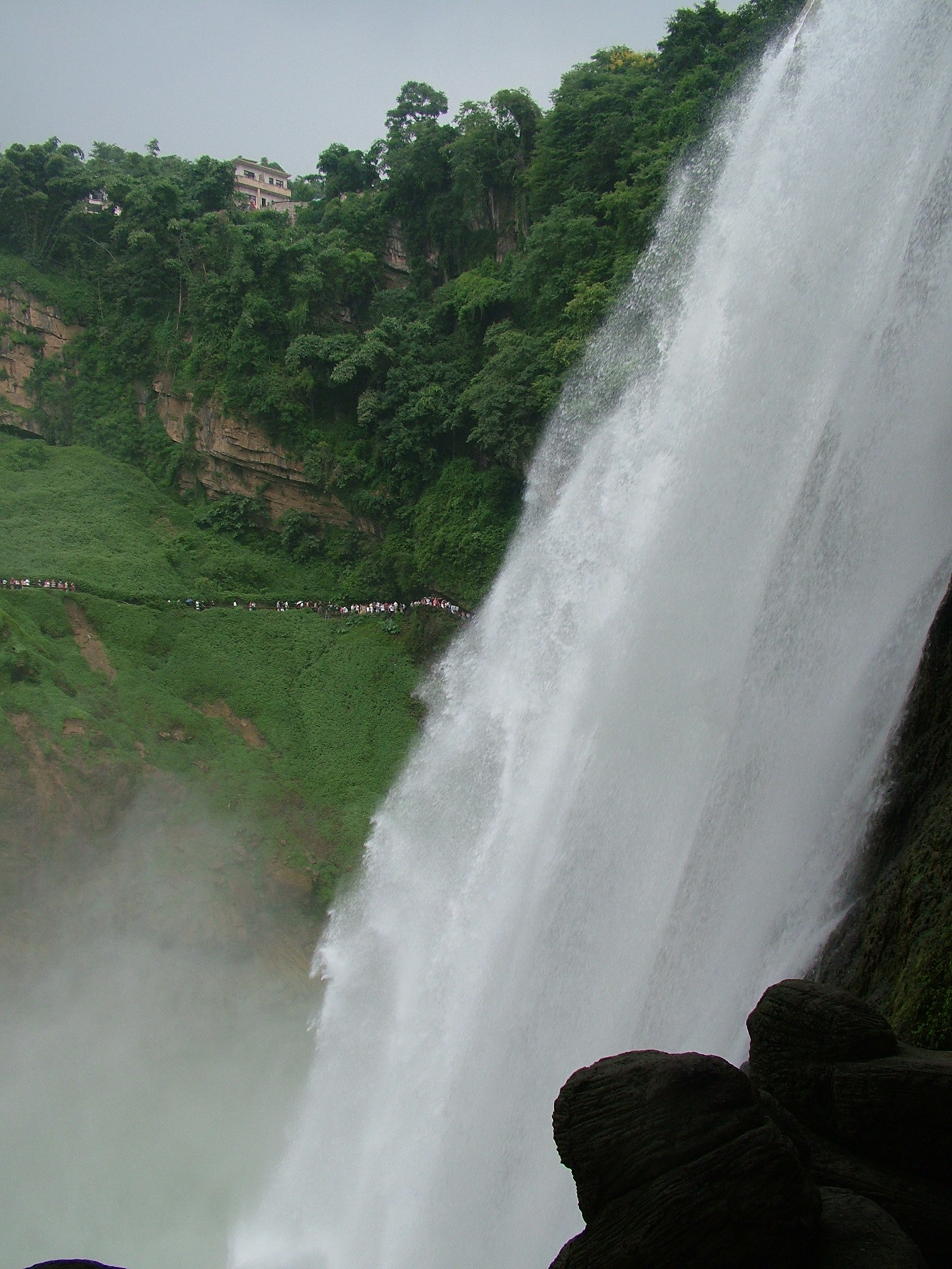 从黄果树瀑布的水帘洞观察瀑布